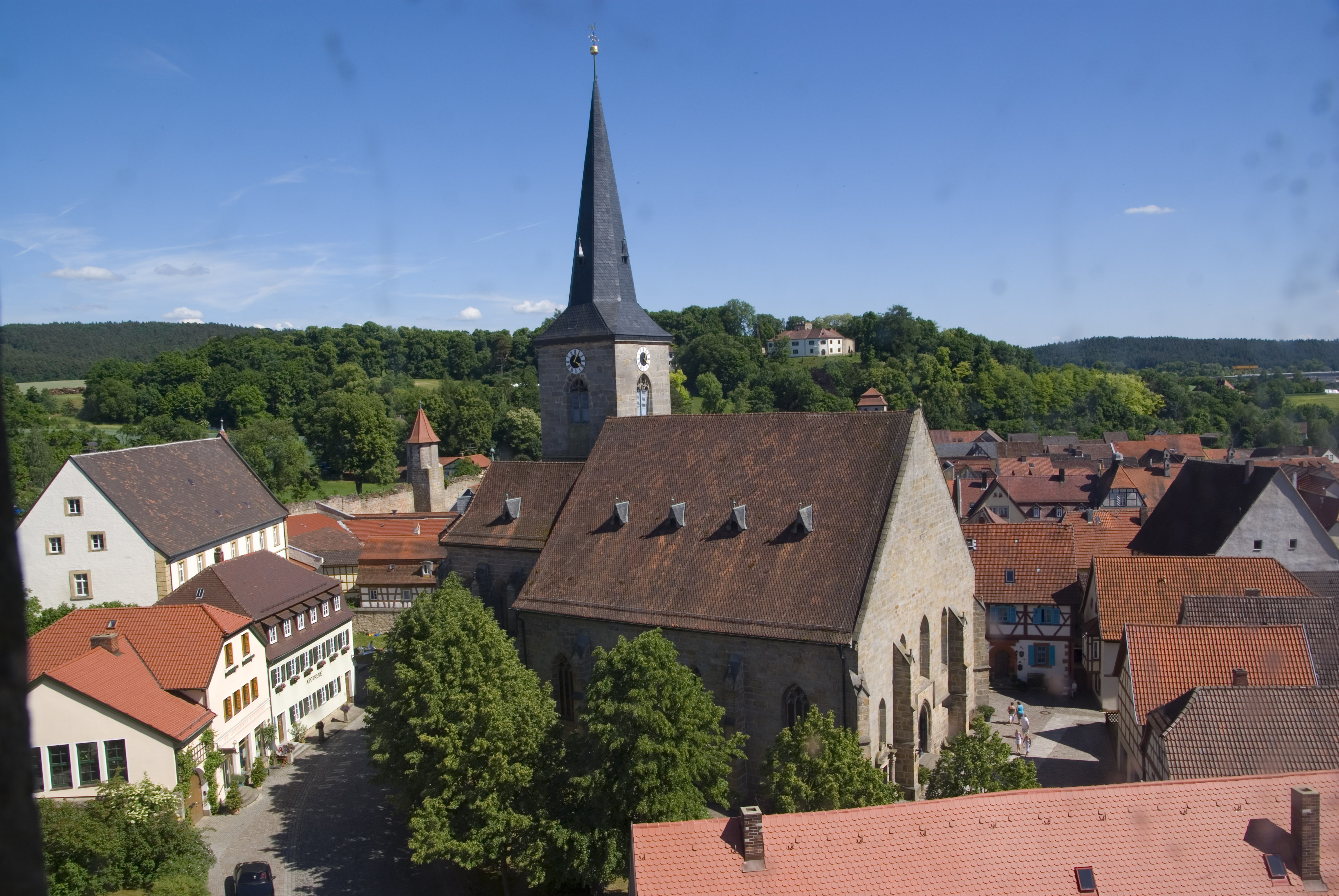 Kirche in Seßlach bei Coburg. Dreck auf dem Bild stammt von der Fensterscheibe im Turm, die stark verunreinigt war.